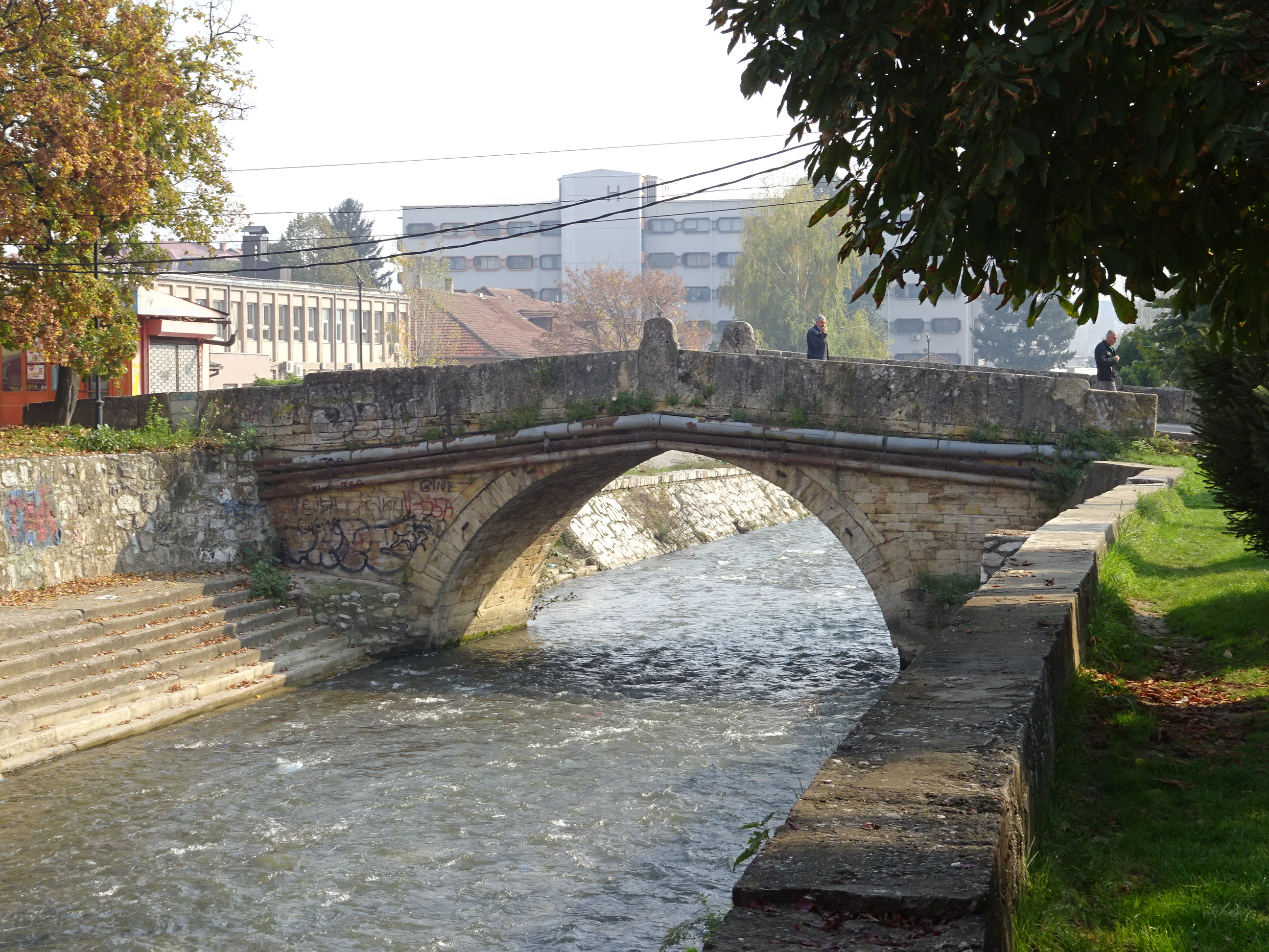 Камениот мост во Тетово Ова е фотографија на споменик на културата во Македонија со типски код: F05This is a a photo of a cultural monument in North Macedonia with type id: F05